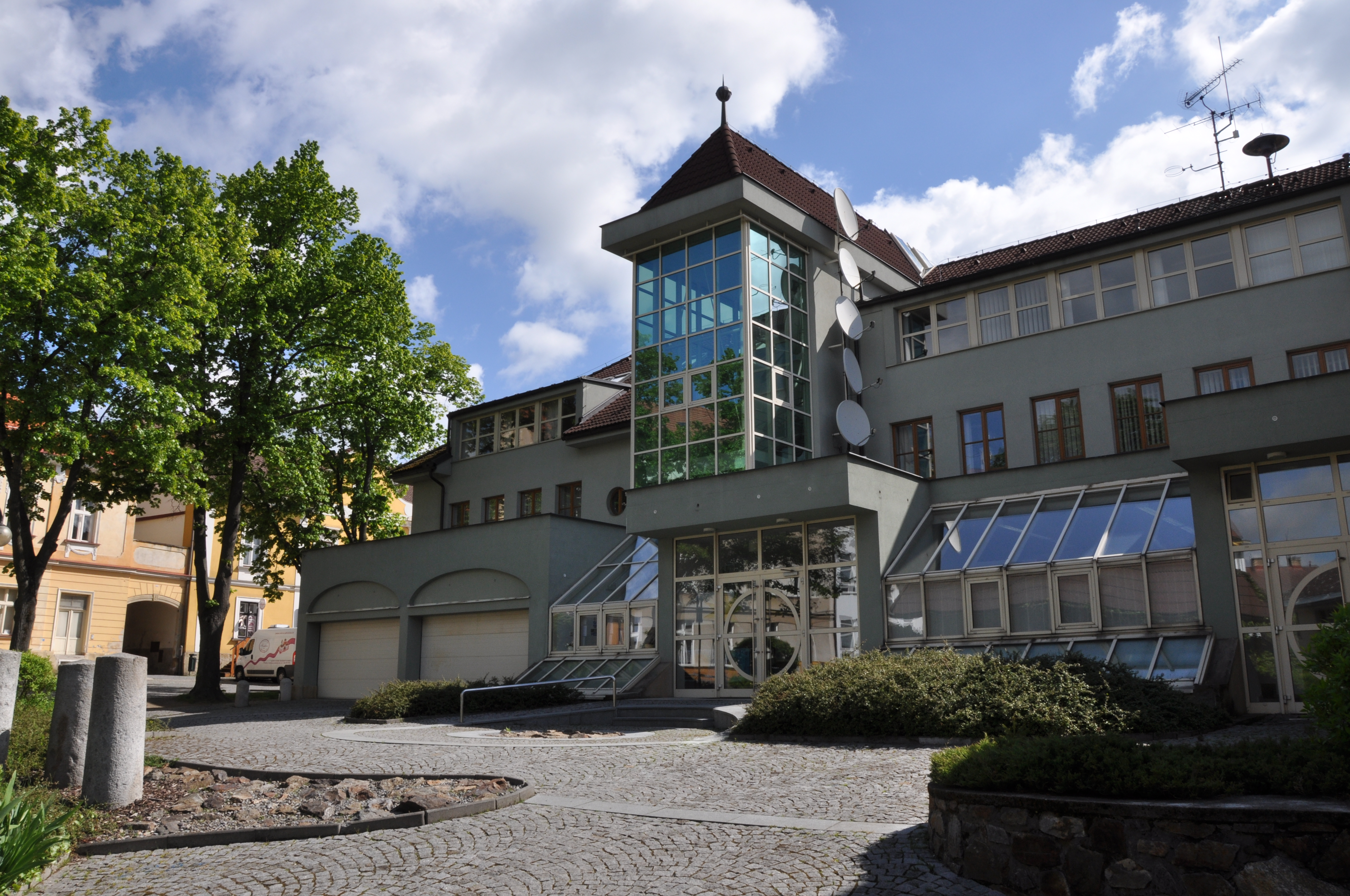 Zadní část radnice města Přibyslav - městský úřad a malý parčík. Dům č. p. 1. Bechyňovo náměstí. Město Přibyslav. Okr. Havlíčkův Brod. Kraj Vysočina. Czech Republic.